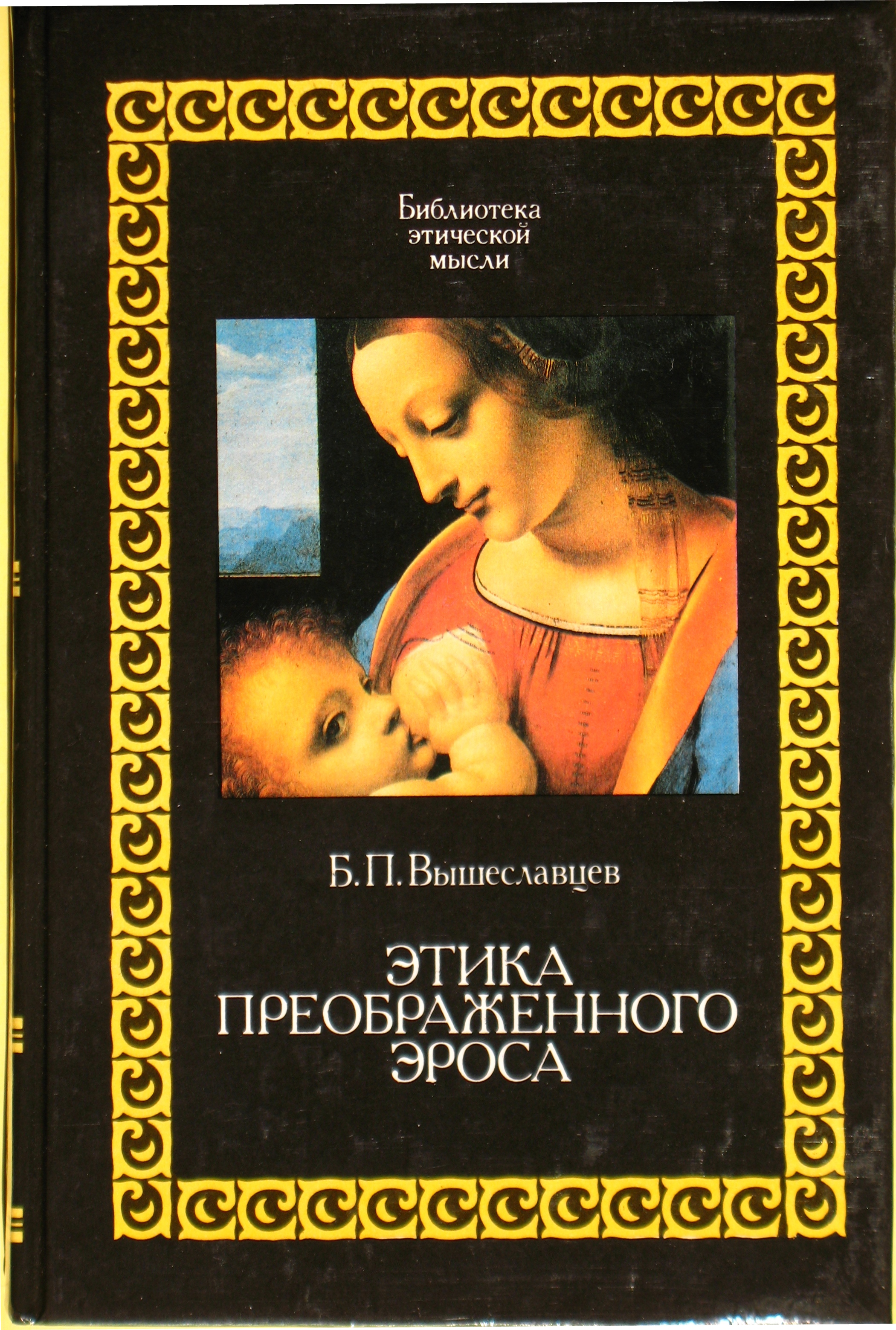 Boris Vysheslavtsev book. Picture - Leonardo da Vinci. Madonna Litta. Серия "Библиотека этической мысли". Вышеславцев Борис, Этика Преображенного эроса. Москва, изд. "Республика", 1994, тираж 60 000, 368 стр. Обложка - картина Леонардо да Винчи "Мадонна Литта", фрагмент.